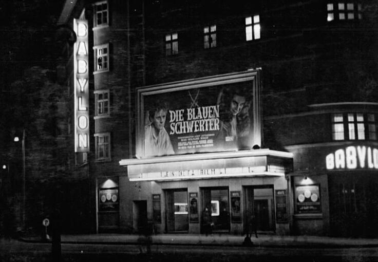 Berlin, Kino "Babylon", Nacht Berlin bei Nacht Das Babylon-Filmtheater in Berlin Aufn. Illus Köhler 4980-50 (4) Mlk 5.1.50